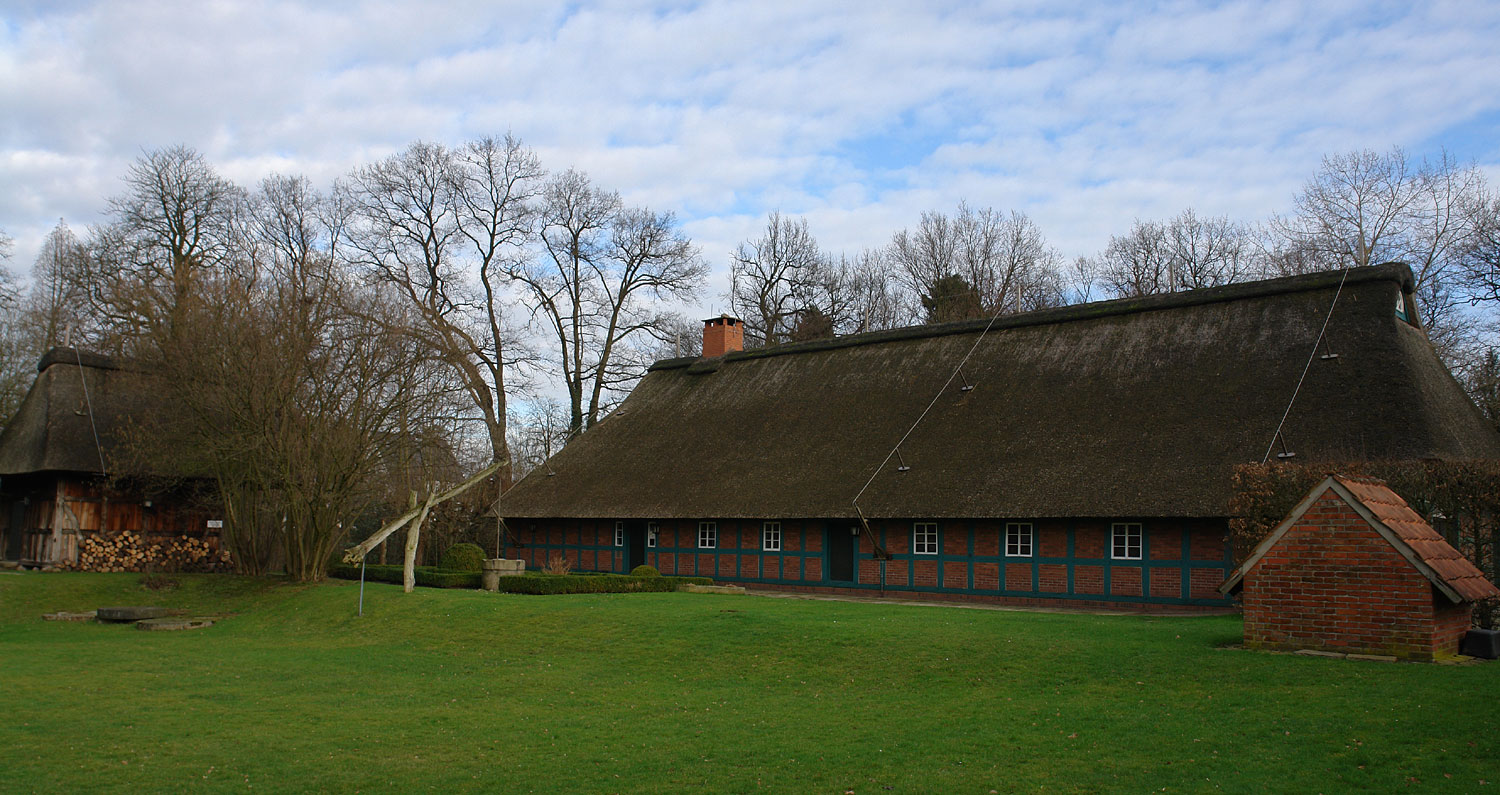 Focke-Museum Bremen: Haus Mittelsbüren (1586)) Das abgebildete Objekt ist ein geschütztes Kulturdenkmal in der Freien Hansestadt Bremen, mit der Nr. 1701 beim Landesamt für Denkmalpflege registriert.